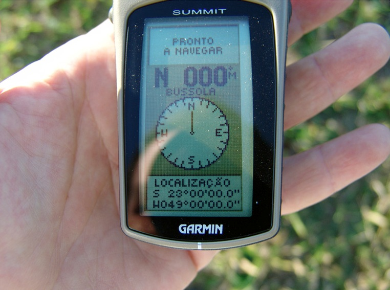 Um GPS marcando uma confluência geográfica 23º00'00"Sul x 49º00'00"Oeste